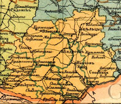 Келецкая губерния в 1896 году